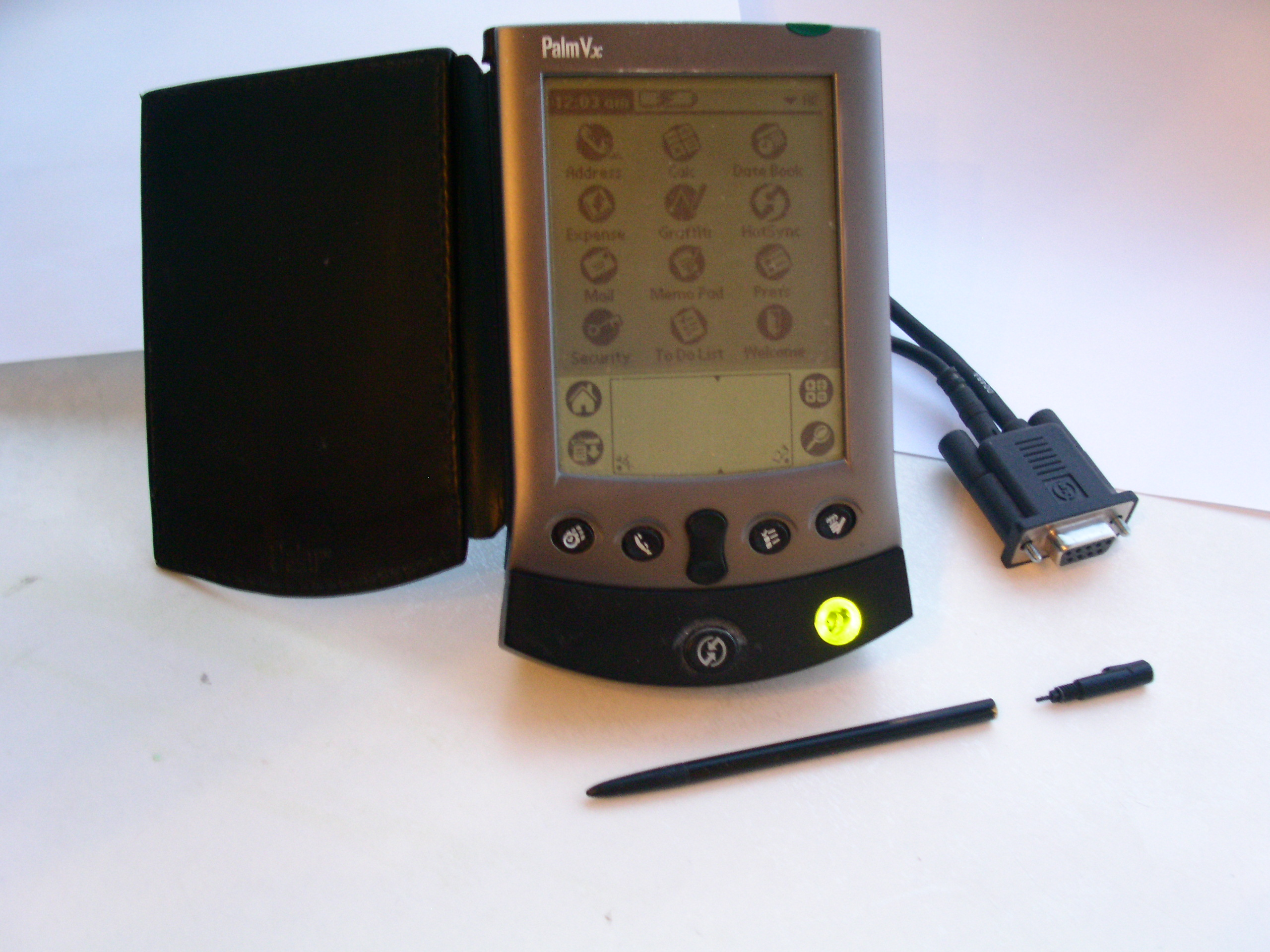 Palm Vx Handheld